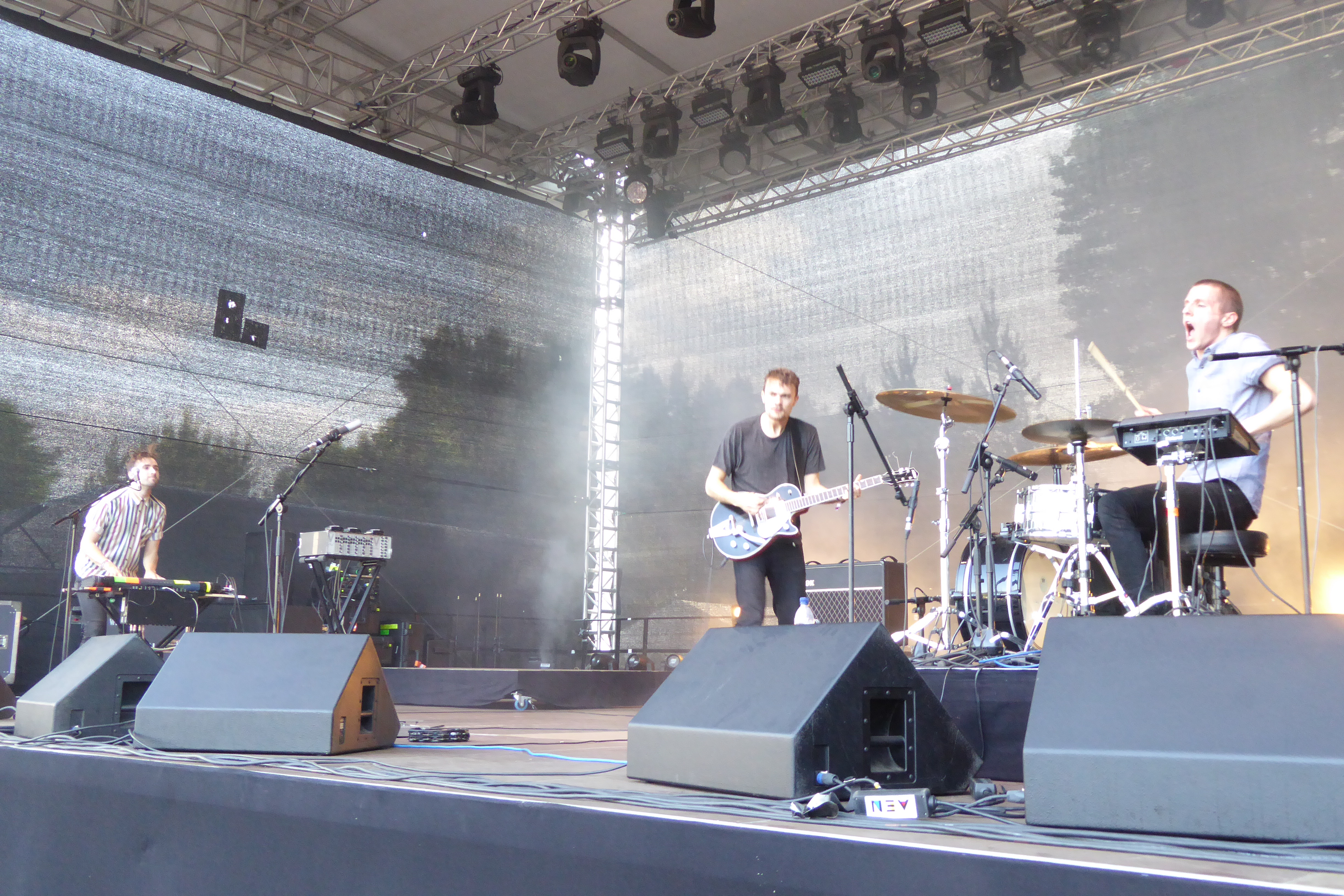 We Are the City beim Immergut Festival 2016